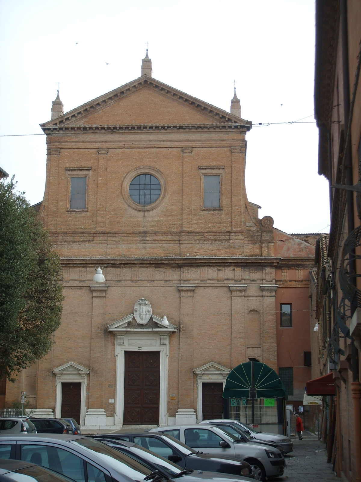 Ferrara, san Michele del Gesù